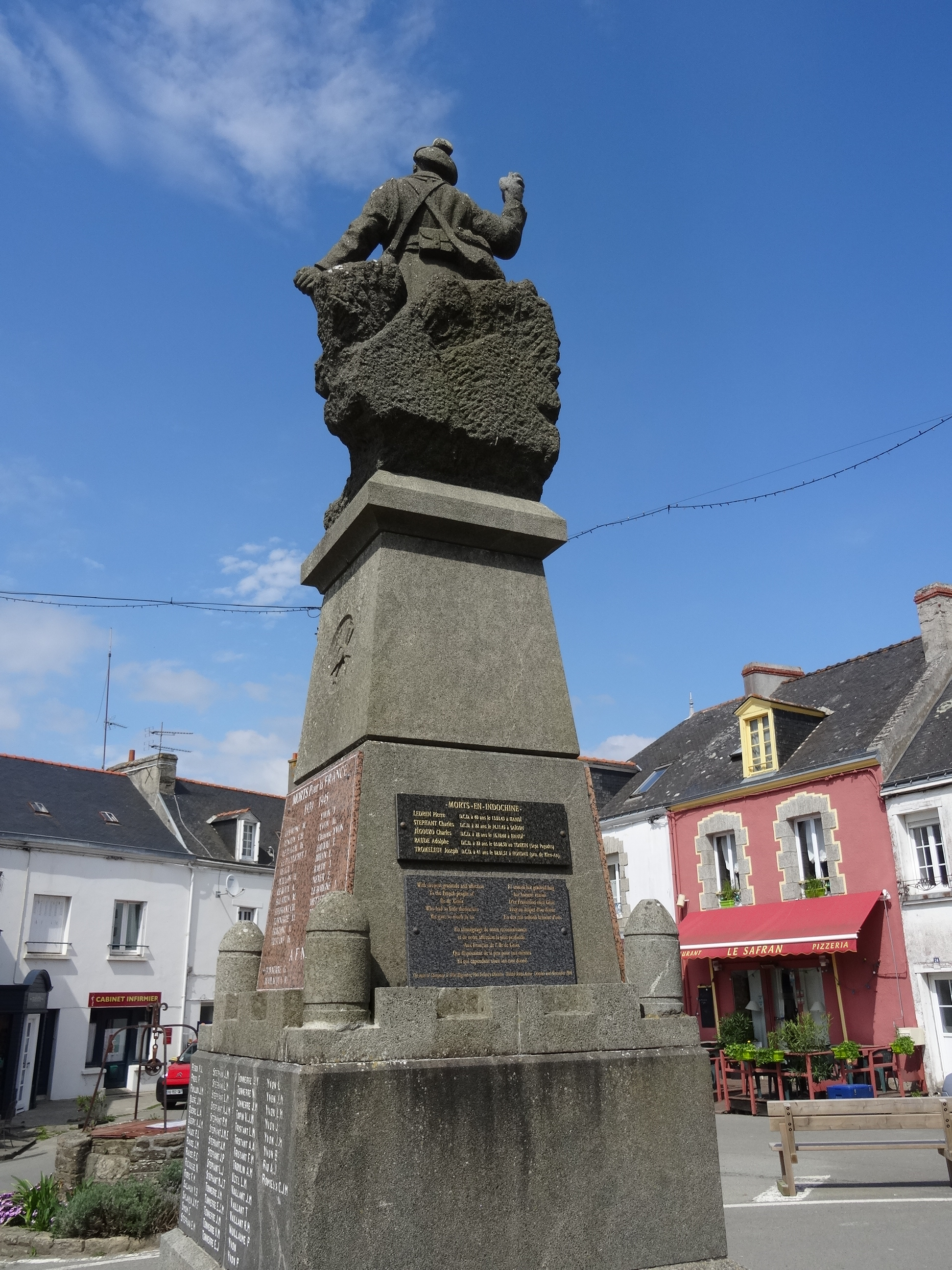 Île de Groix en mai 2016